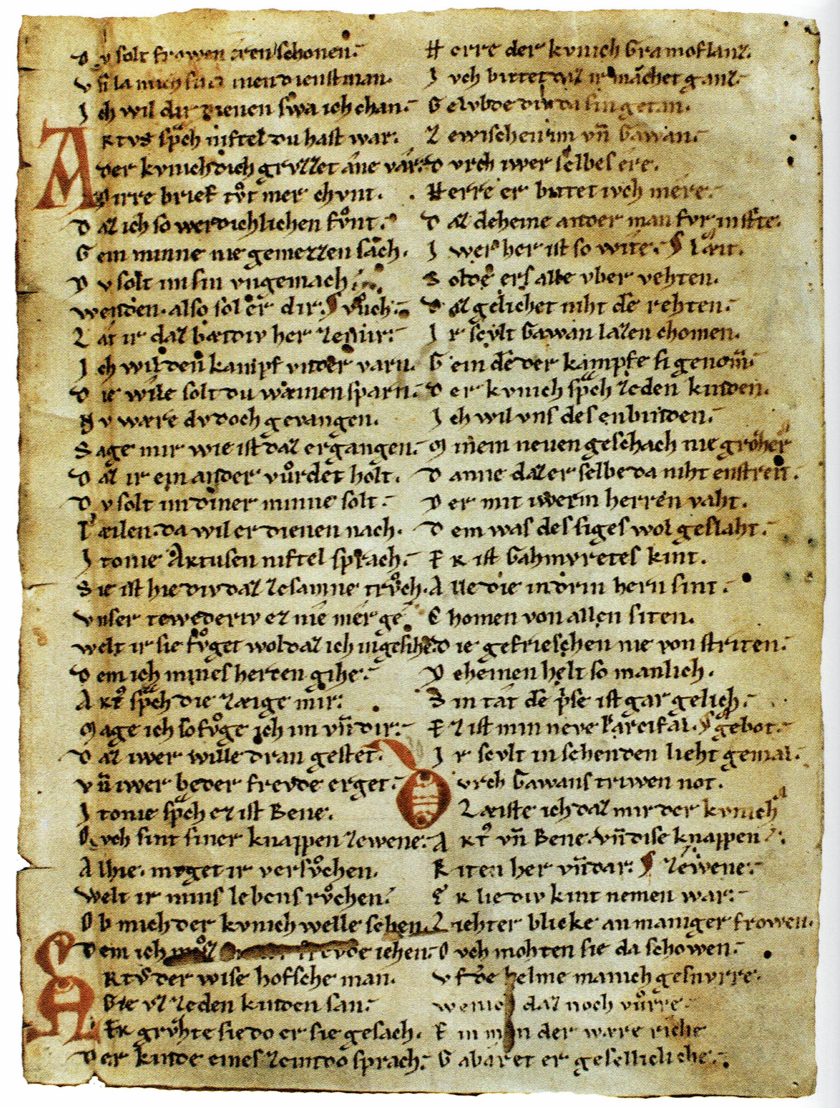 Seite des Amberger Parzival-Fragments, Provinzialbibliothek Amberg 8° Ms. 1